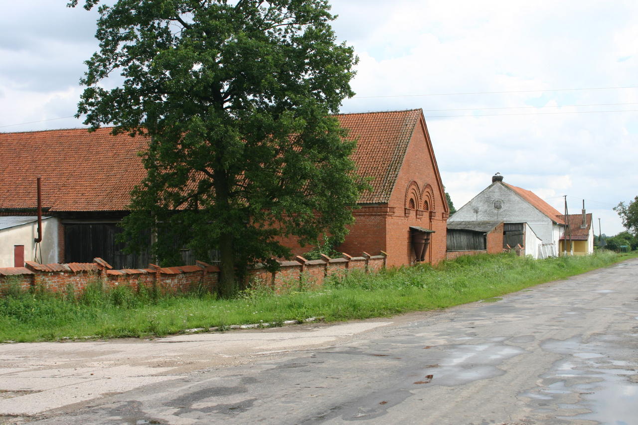 Aptynty, Sicht von Nordwesten.